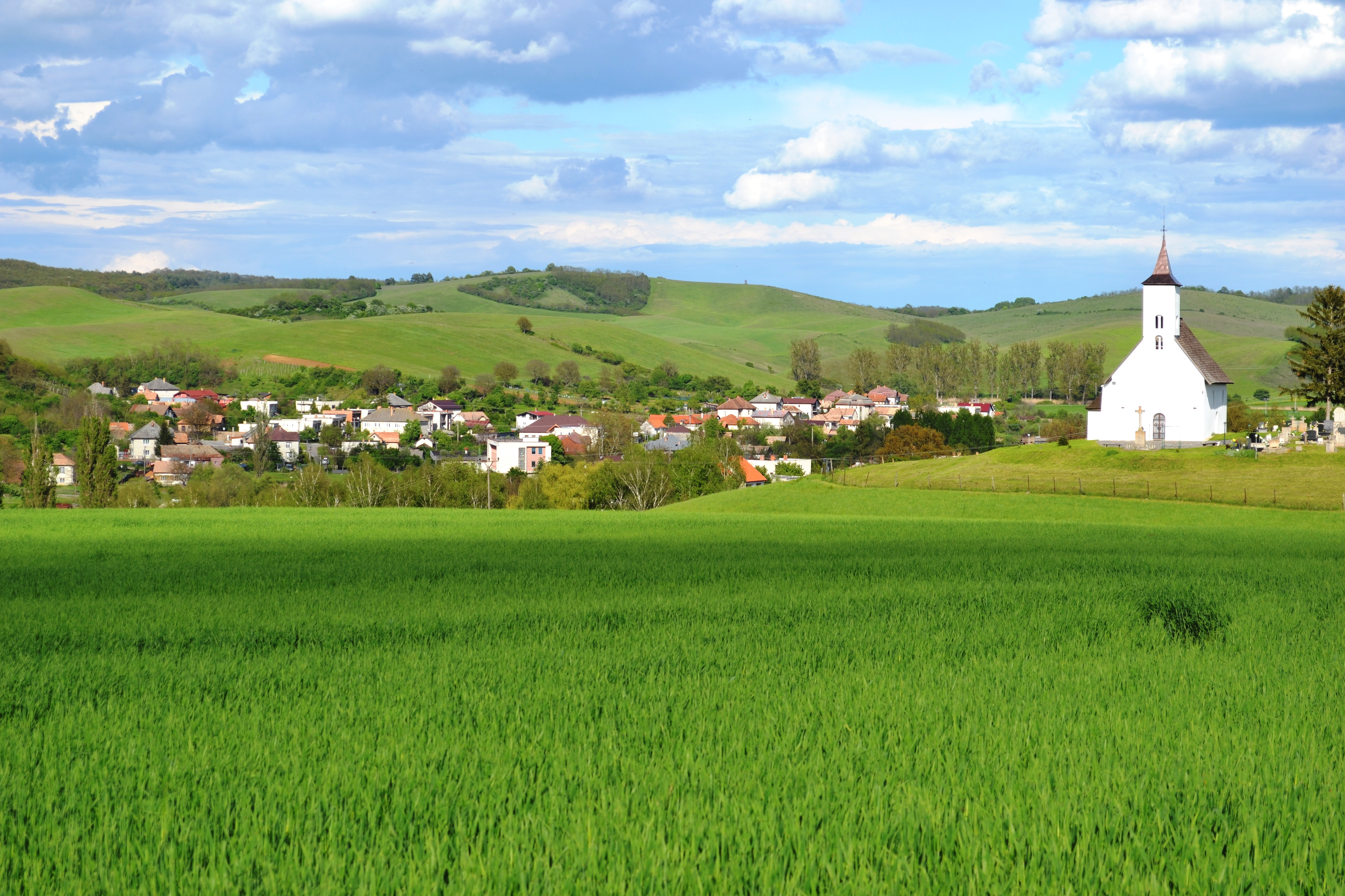 Gemerský Jablonec